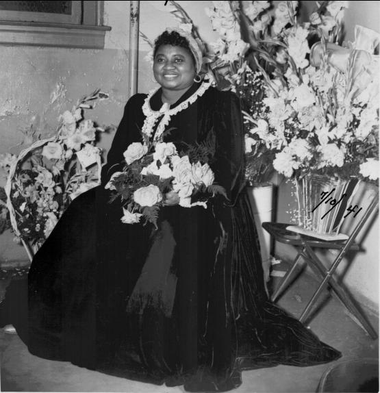 Actress Hattie McDaniel, 1941